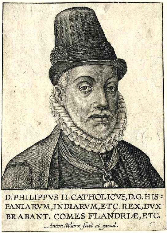 Антоний Вайрикс II "Портрет короля Испании Филиппа II" 1599 - 1604 г.